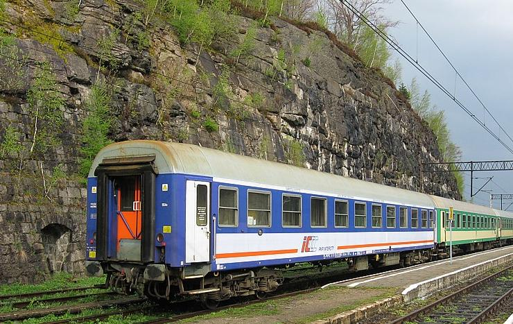 Wagon sypialny PKP Intercity